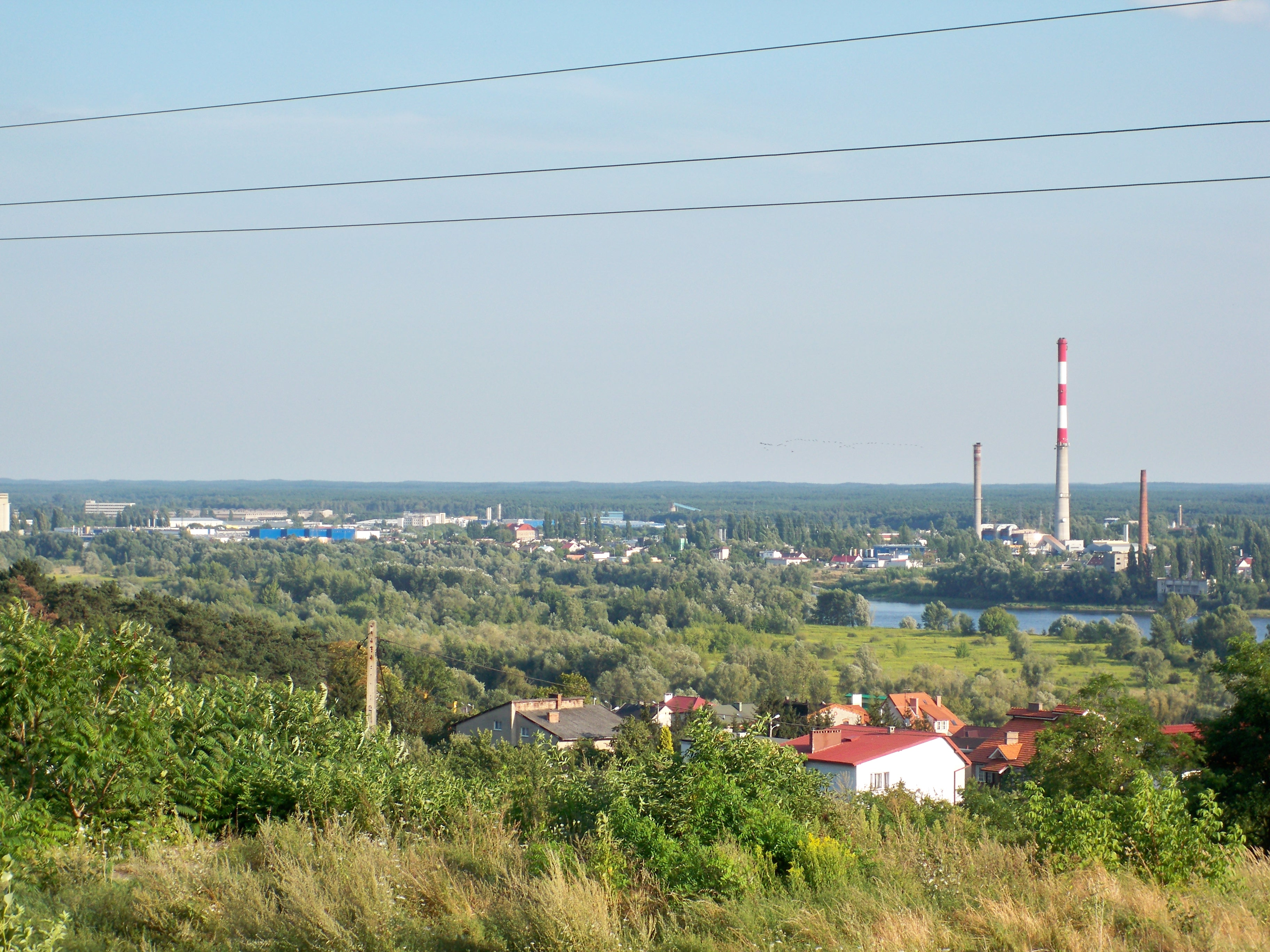 Widok ze Wzgórz Szpetalskich (2009 r.)